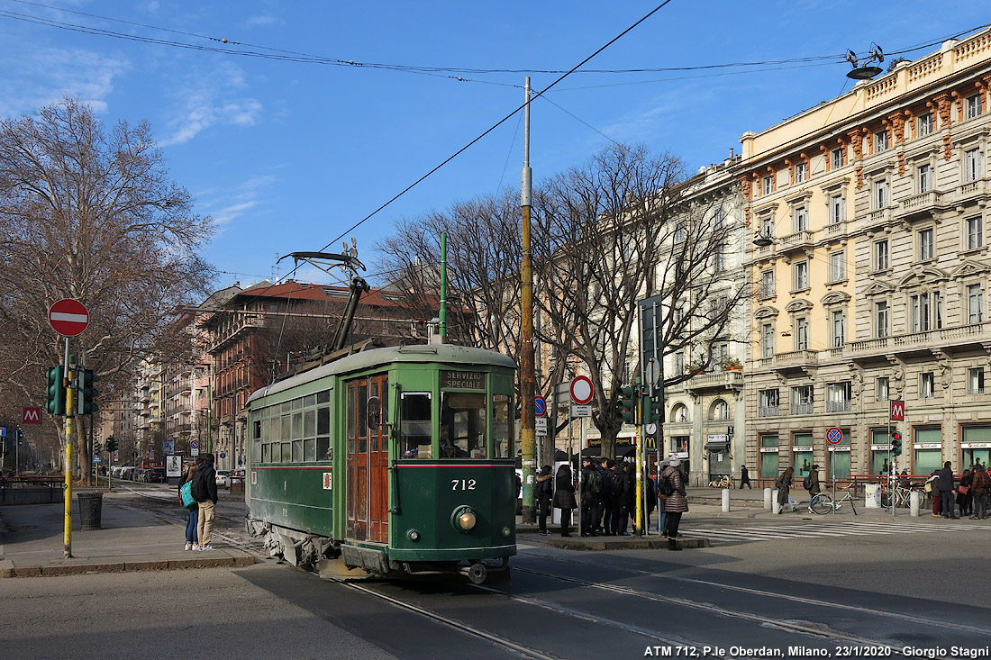 Milano, il tram sabbiera n. 712 attraversa piazza Oberdan il 23 gennaio 2020.